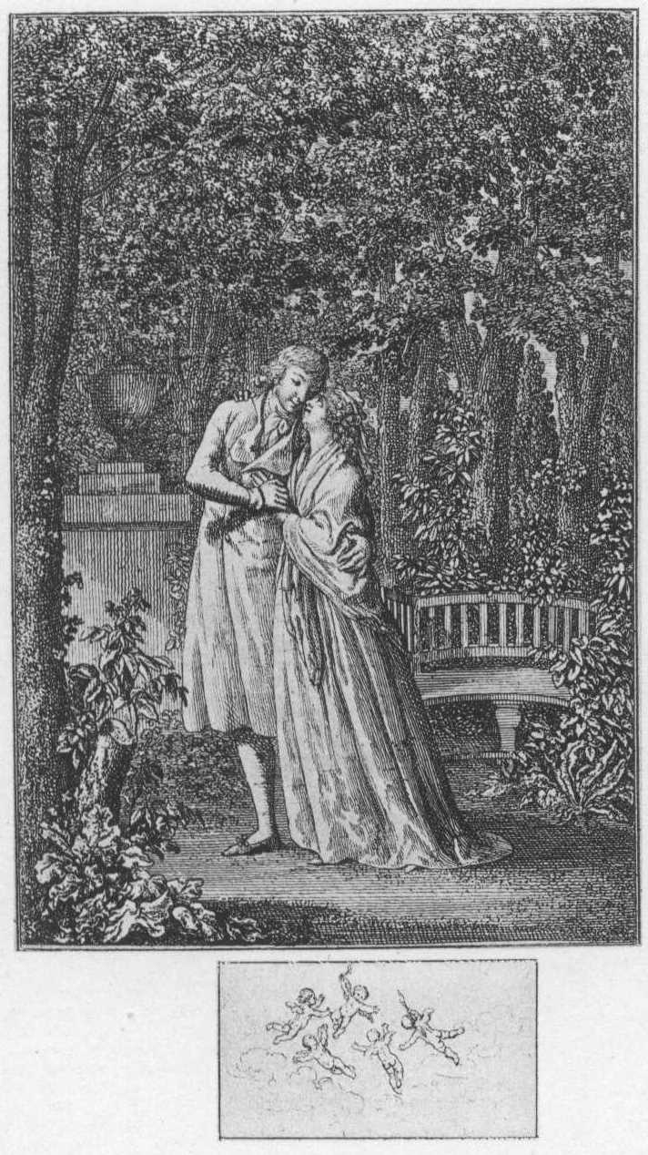 Titelkupfer zu: „Die Brautwerbung“ von W. G. Becker. Unter hohen Plantanen steht Ellerbach mit seiner Braut Julie die ihm ihre Liebe gesteht. (Beigabe zum Almanach und Taschenbuch zum geselligen Vergnügen von W. G. Becker für 1798.) (Beschreibung lt. Quelle)